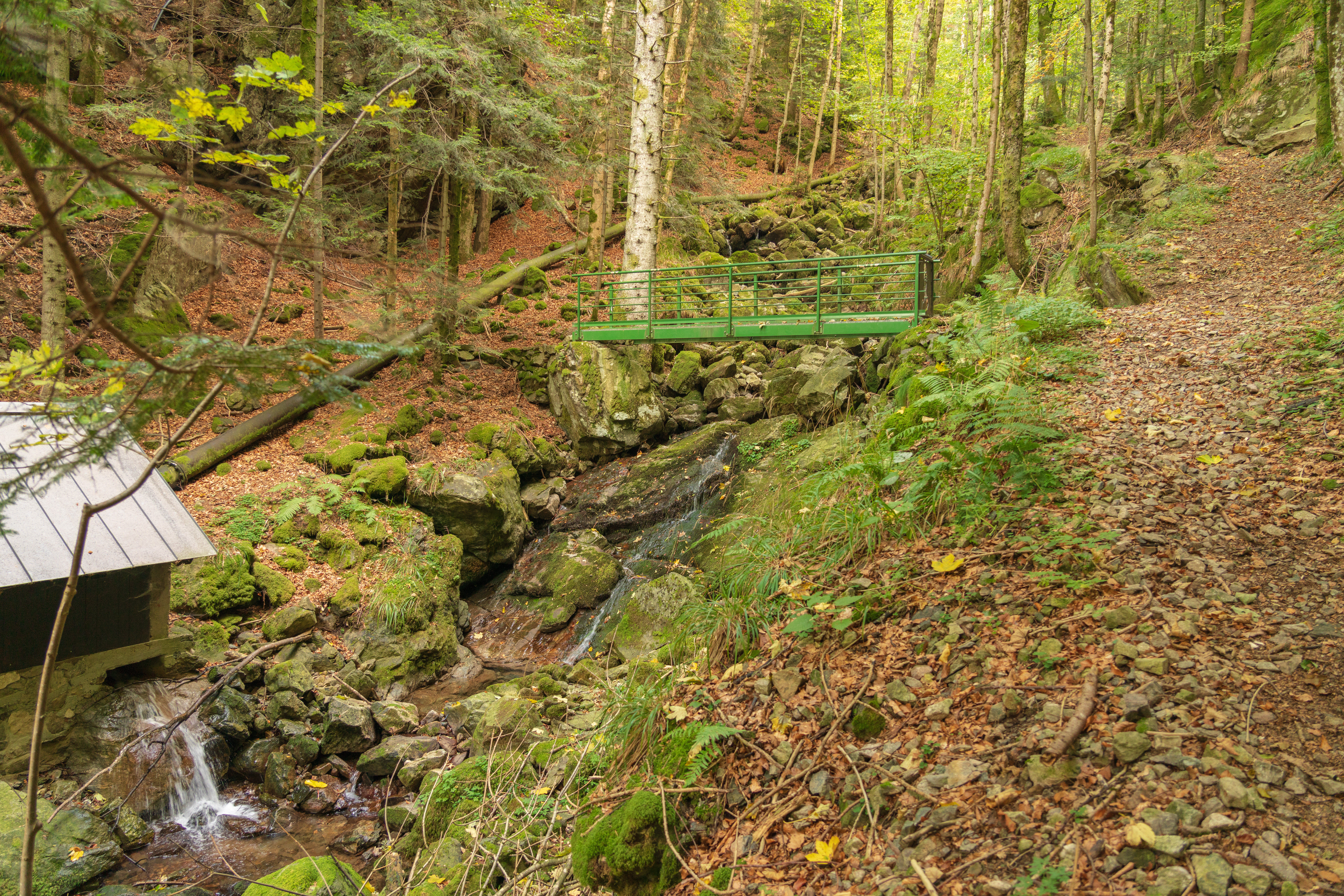 entlang dem Haslachsimonswälder Bach im Naturschutzgebiet Kostgefäll